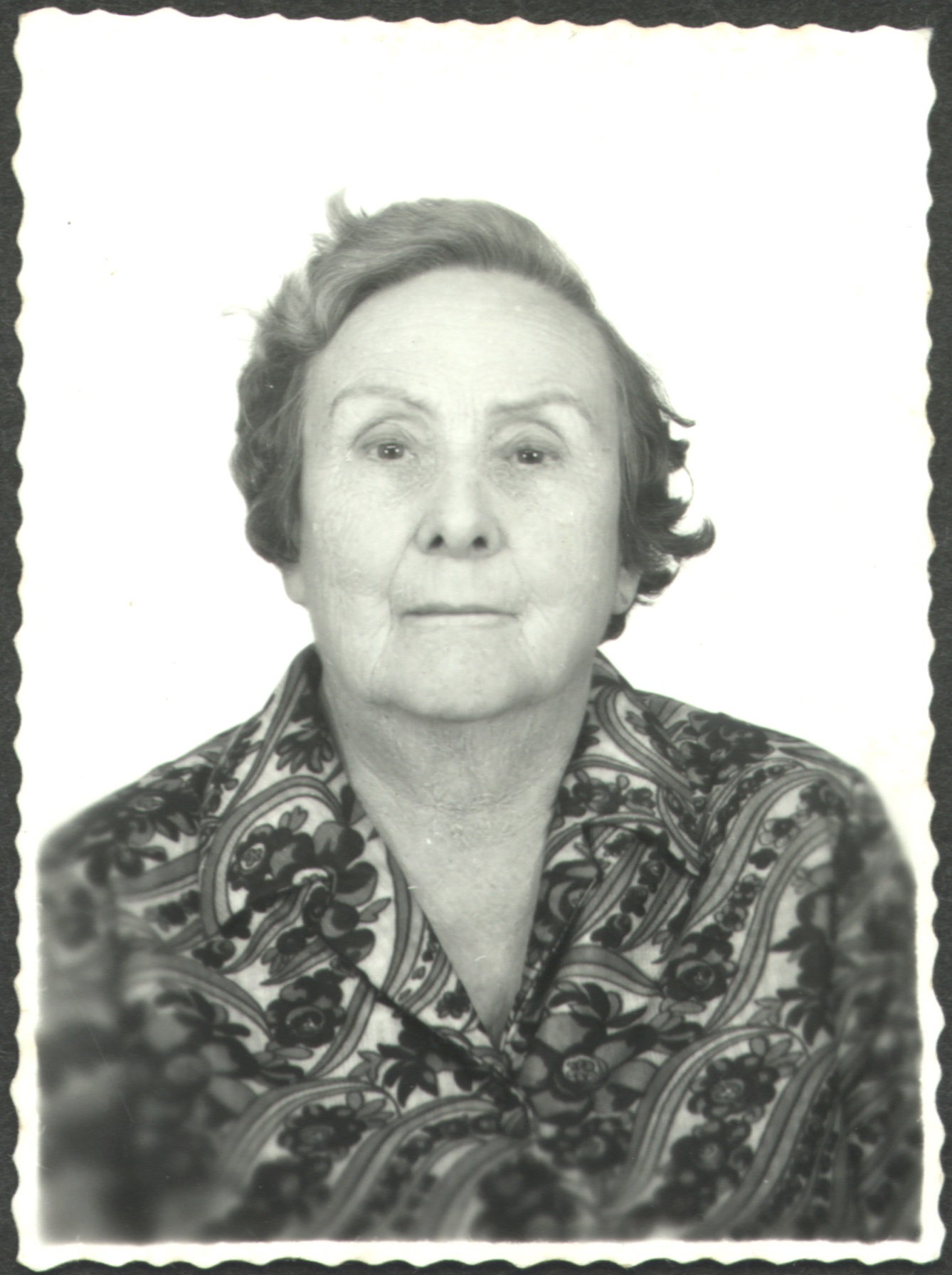 A pesquisadora e feminista brasileira Bertha Lutz. Fundo: Federação Brasileiro pelo Progresso Feminino.